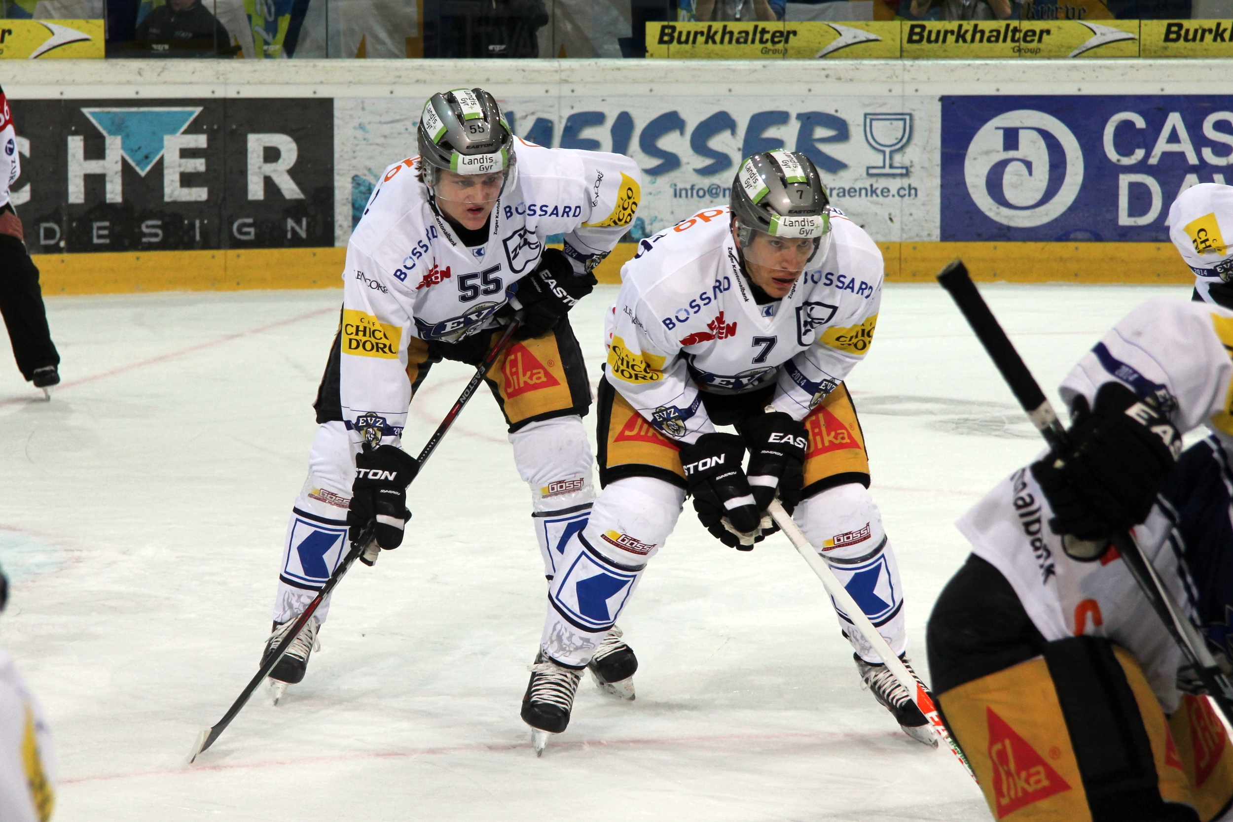 Calle Andersson (Z 55), Björn Christen (Z 7).